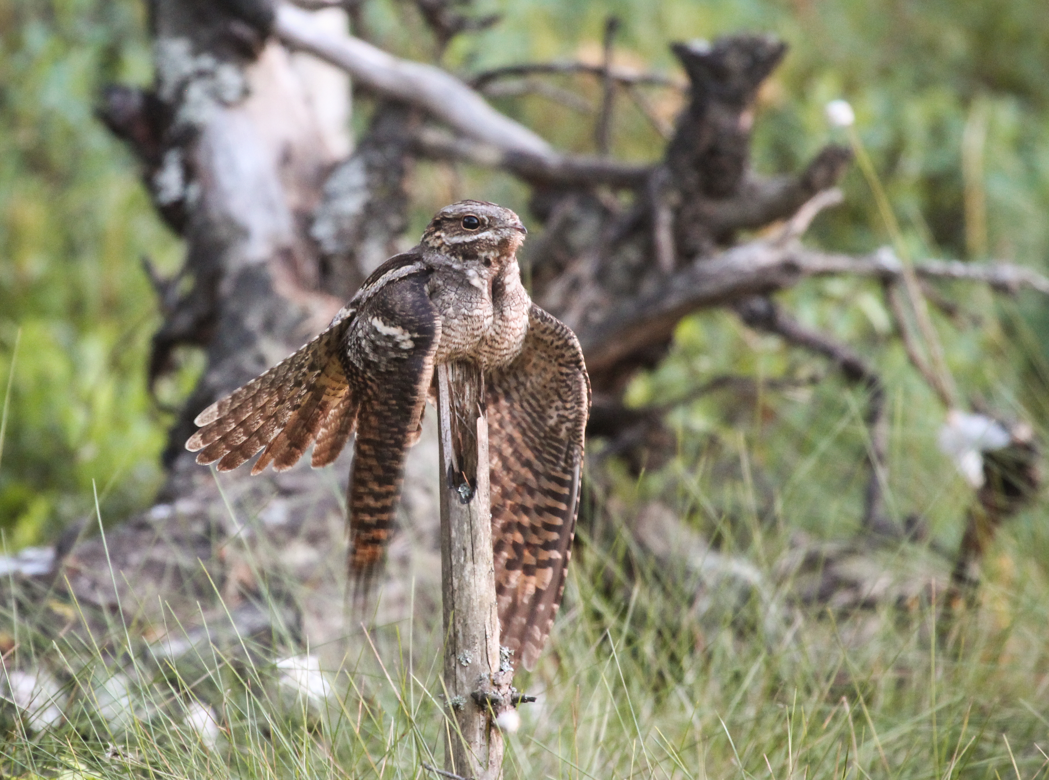 Болото Варех и озеро Варех: От районного центра г. Володарска на северо-запад 30 км, от г. Дзержинска на северо-запад 38 км, от п. Фролищи на юго-восток 3 км, от п. Мулино на северо-запад 8 км,Володарский район, Нижегородская область This image is related to the protected area of Russia number 5210136